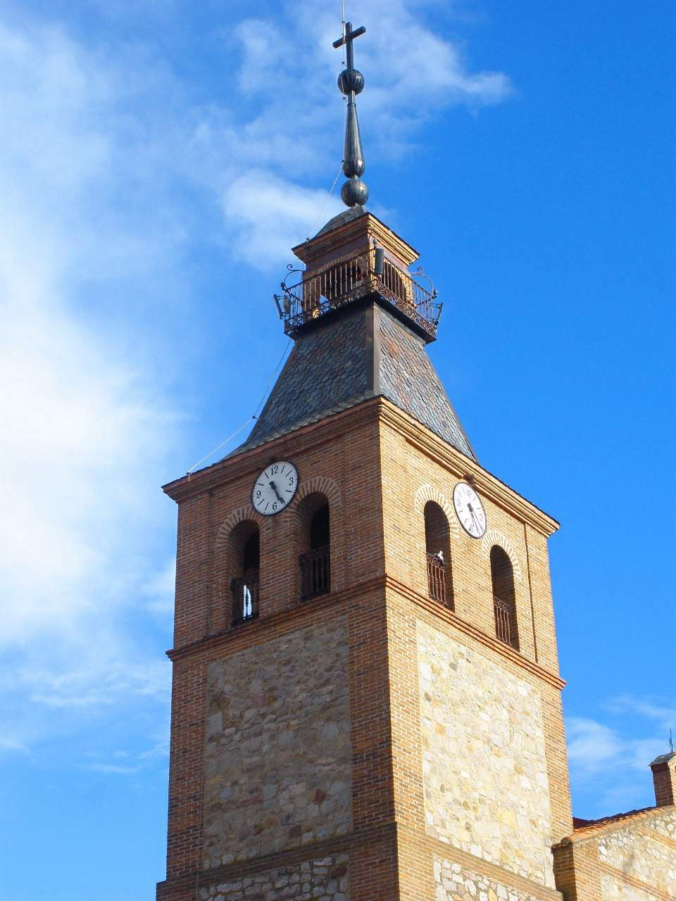 Santa María del Páramo (León) - Iglesia de Nuestra Señora de la Asunción